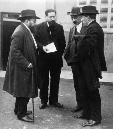 Premier congrès du Parti communiste français, Marseille, 1921. De gauche à droite : Charles Rappoport, Daniel Renoult, Ludovic-Oscar Frossard, Marcel Cachin.